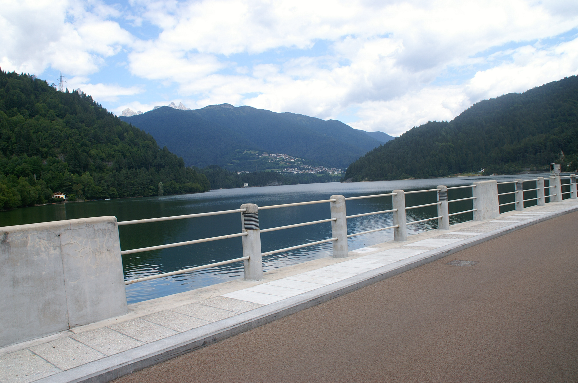 Diga Pieve di Cadore